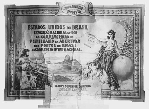 Diploma da Exposição Nacional de 1908 em Commemoração do 1º Centenário da Abertura dos Portos do Brasil ao Commércio Internacional, ocorrida na cidade do Rio de Janeiro/RJ, pelo qual o juri superior desse evento conferiu a José mentor Guilherme de Mello a medalha de prata pelo estado do Maranhão pela contribuição significativa de suas atividades exportadoras para o comércio internacional daquele estado.